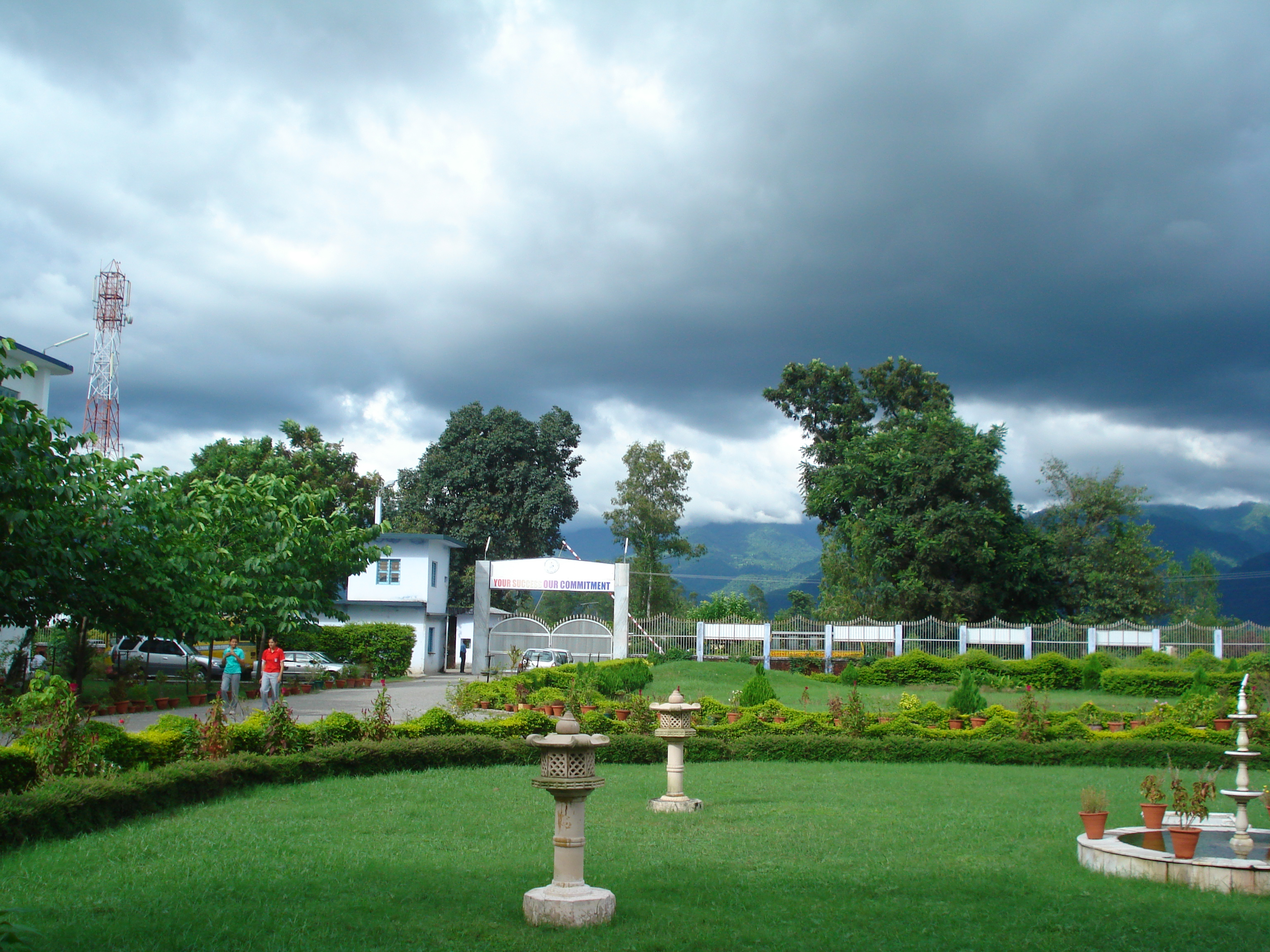 Amrapali